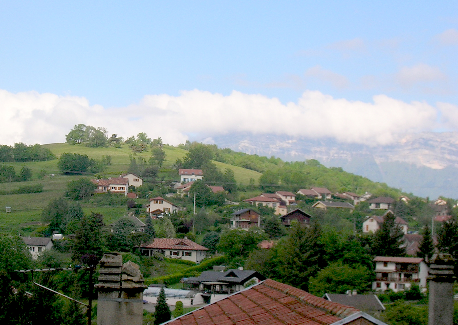 Montchaboud, Isère, AuRA, France.